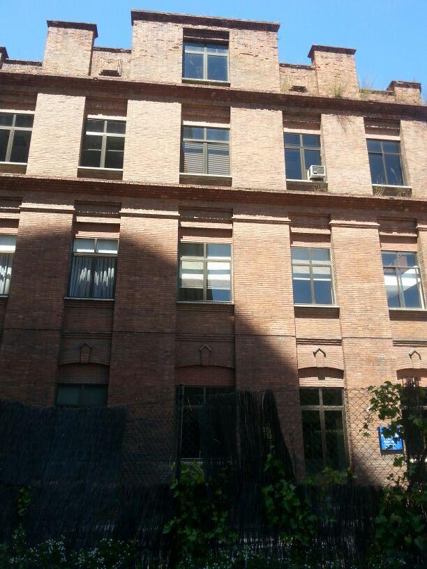 Edificio de control térmico antigua Fábrica de La Felguera (Asturias)